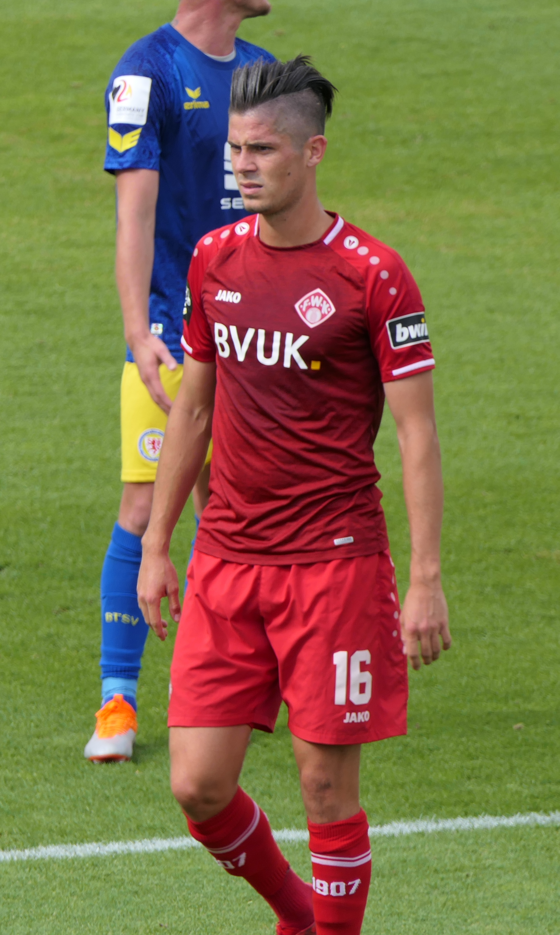 Der Fussballprofi Dennis Mast im Trikot der Würzburger Kickers beim Heimspiel gegen Eintracht Braunschweig am 22.09.2018.